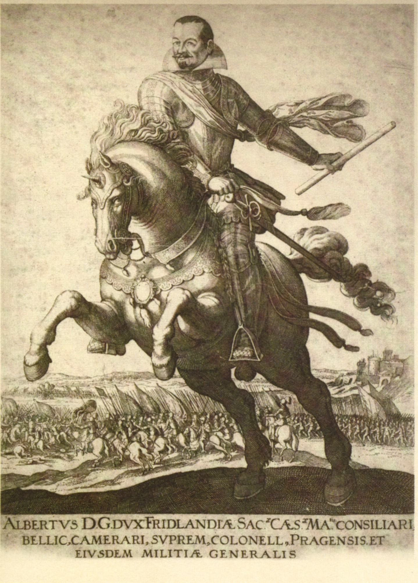 Reiterbild Wallensteins, Kupferstich ohne Jahresangabe. Plattengröße des Originals 35, 3 x 26,6 cm Inschrift (nach Auflösung der Abkürzungen): ALBERTUS DEI GRATIA DUX FRIDLANDIAE SACRAE CAESAREAE MAIESTATIS CONSILIARIUS BELLICUS, CAMERARIUS, SUPREMUS COLONELLUS PRAGENSIS ET EIUSDEM MILITIAE GENERALIS